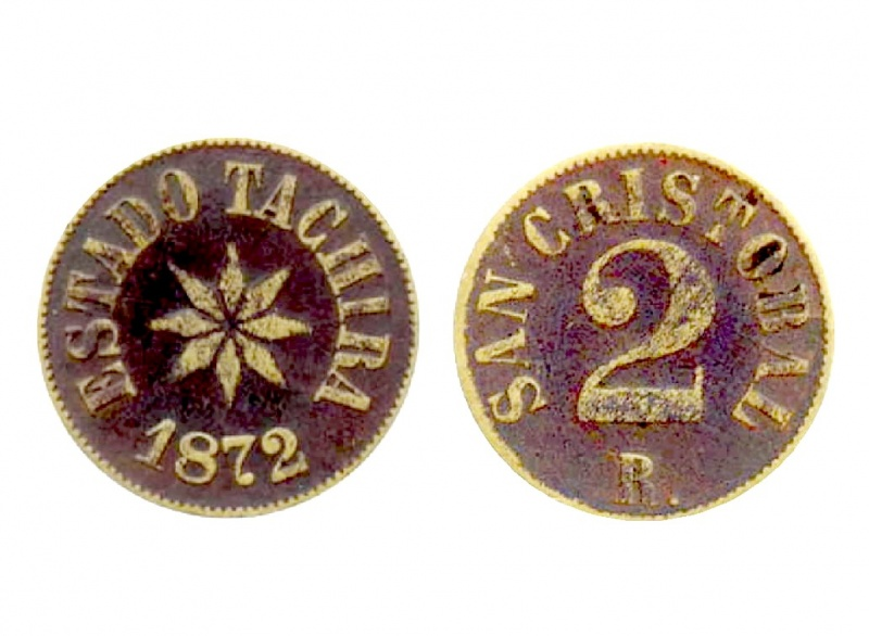 Moneda de 2 reales. Emisor Gogierno del estado Táchira - Venezuela.